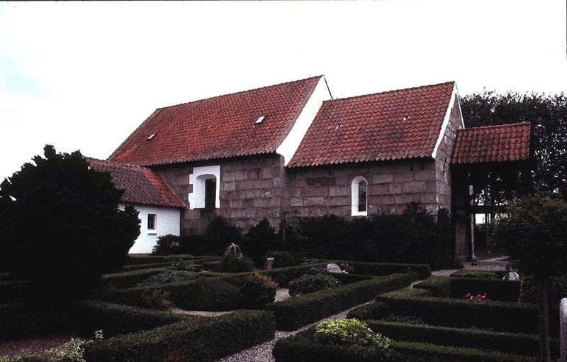 Sæby Kirke, Skive Kommune